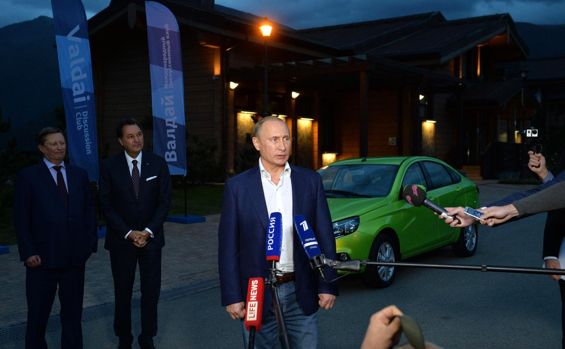 Президент России Владимир Путин тестирует автомобиль «Лада Веста»